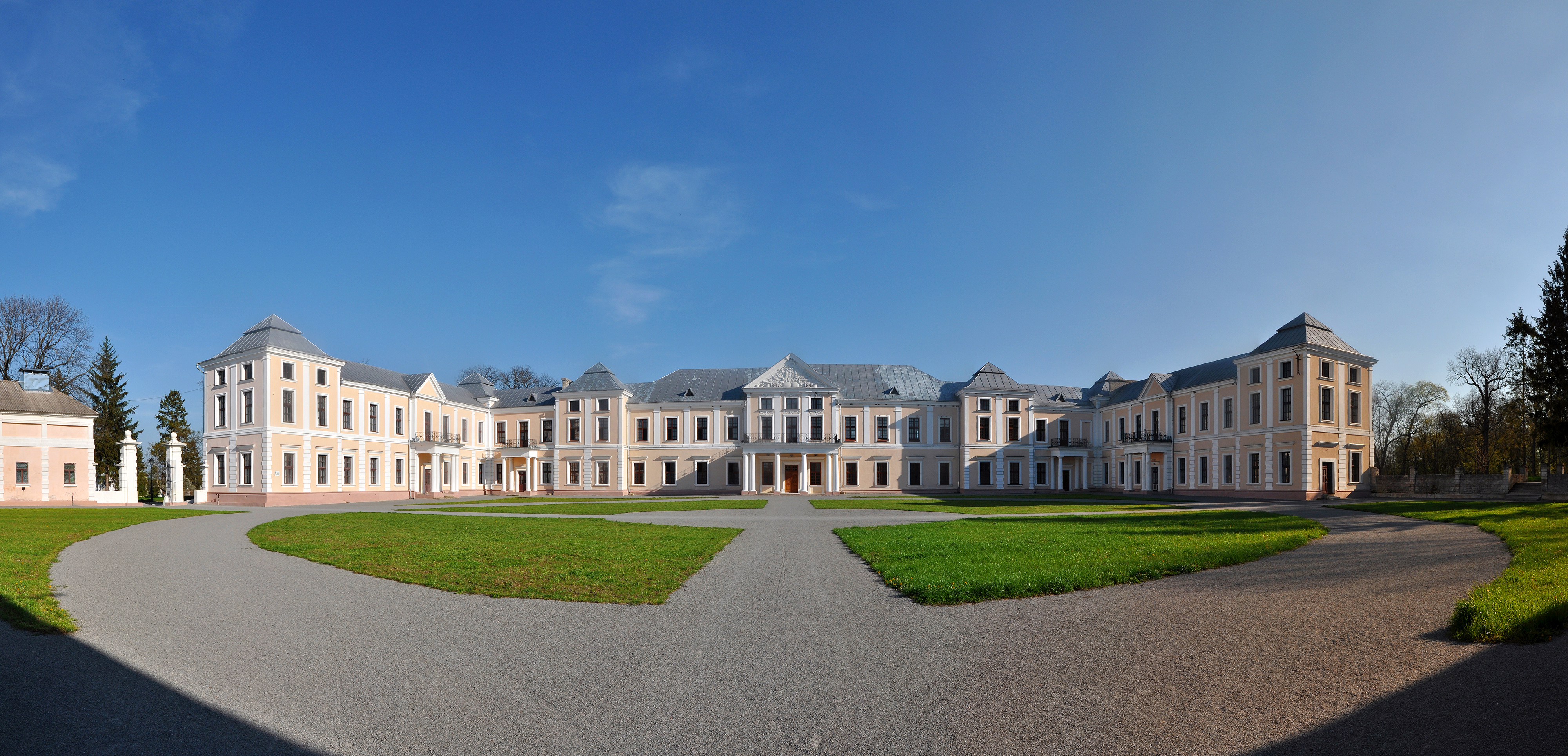 Палацовий комплекс, Вишнівець